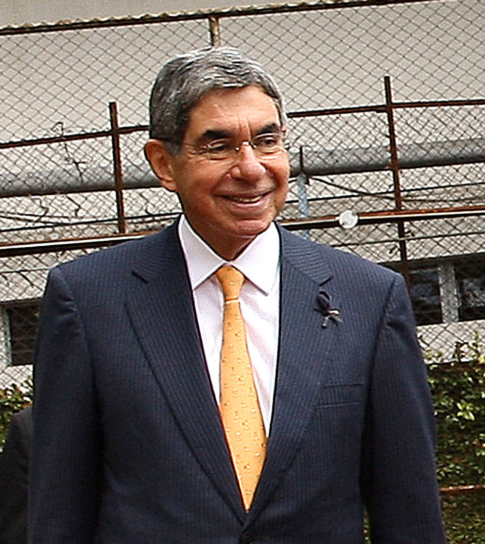 Presidente Lula, ao lado do presidente da Costa Rica, Oscar Arias, cumprimenta crianças durante cerimônia oficial de chegada ao país